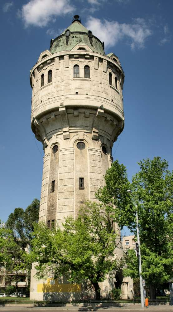 Az újpesti víztorony. Épült Mihailich Győző és Dümmerling Ödön tervei szerint 1911-12-ben This is a photo of a monument in Hungary, Identifier: 11318